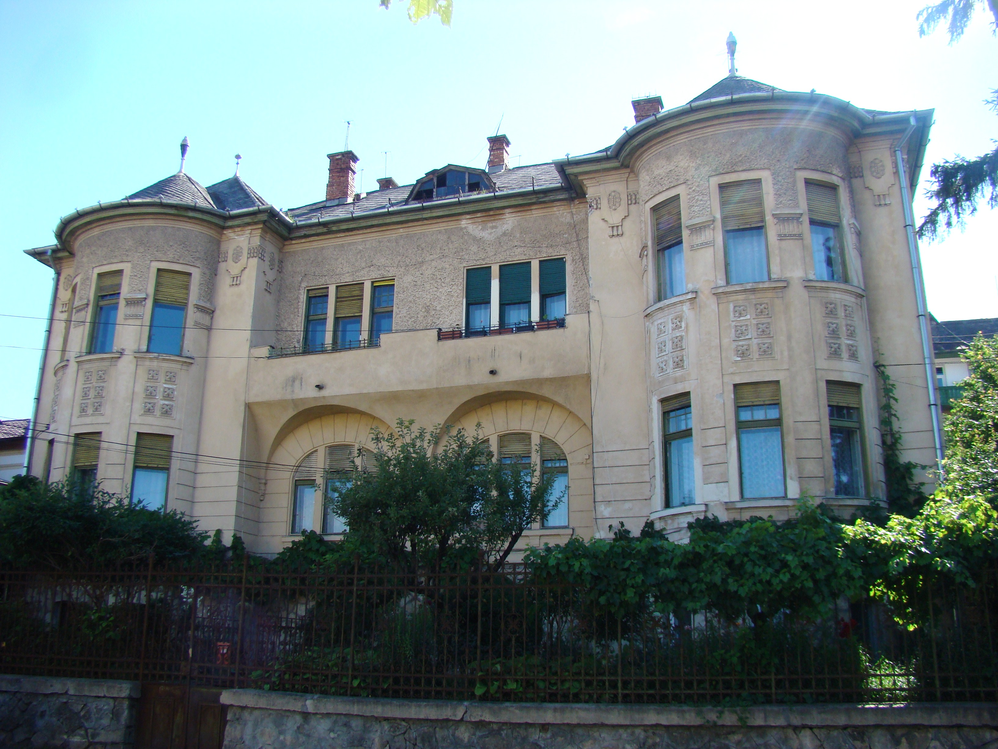 Clădire monument istoric, str.Andrei Mureșanu, nr. 20